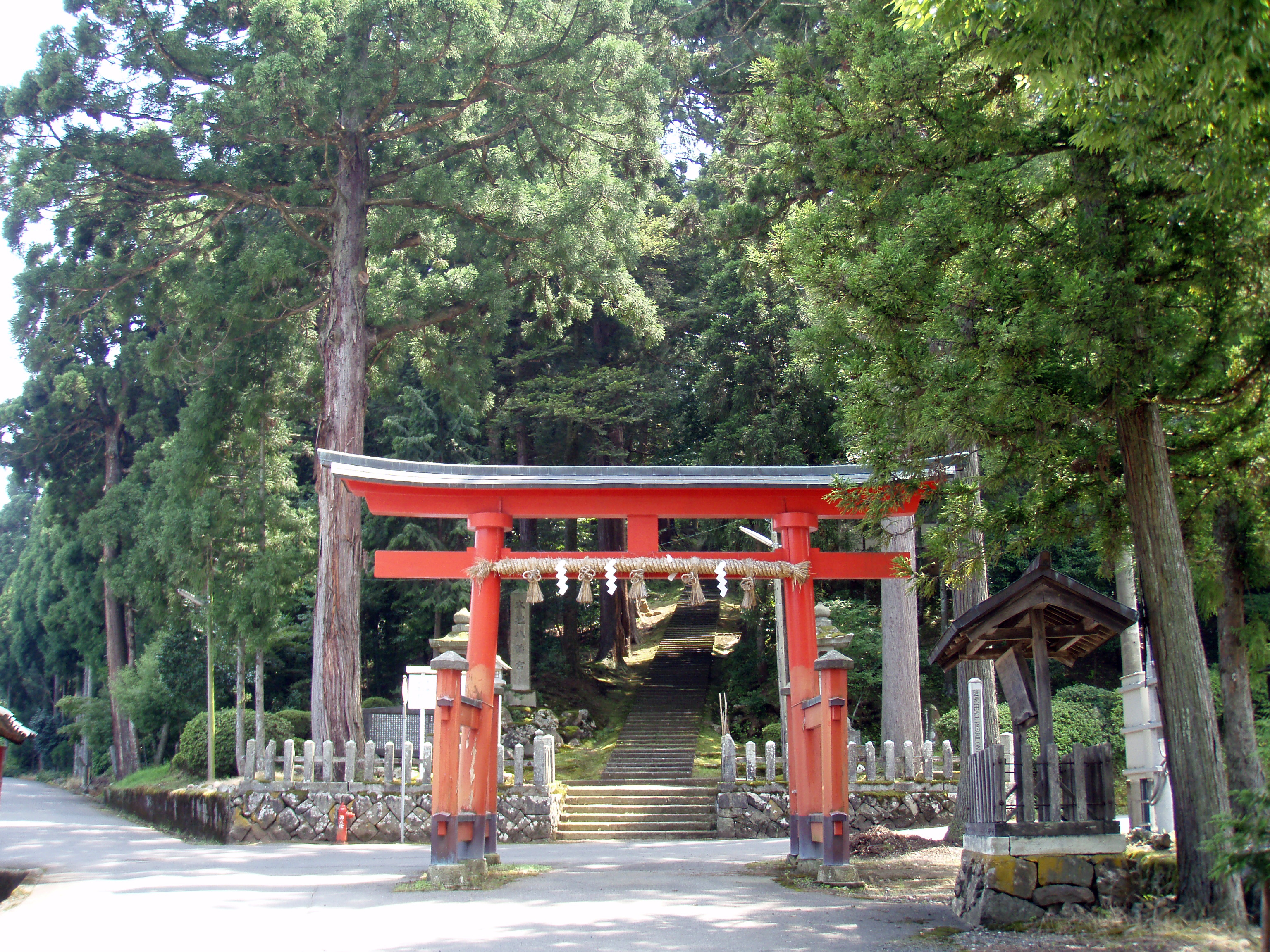 大塩八幡宮